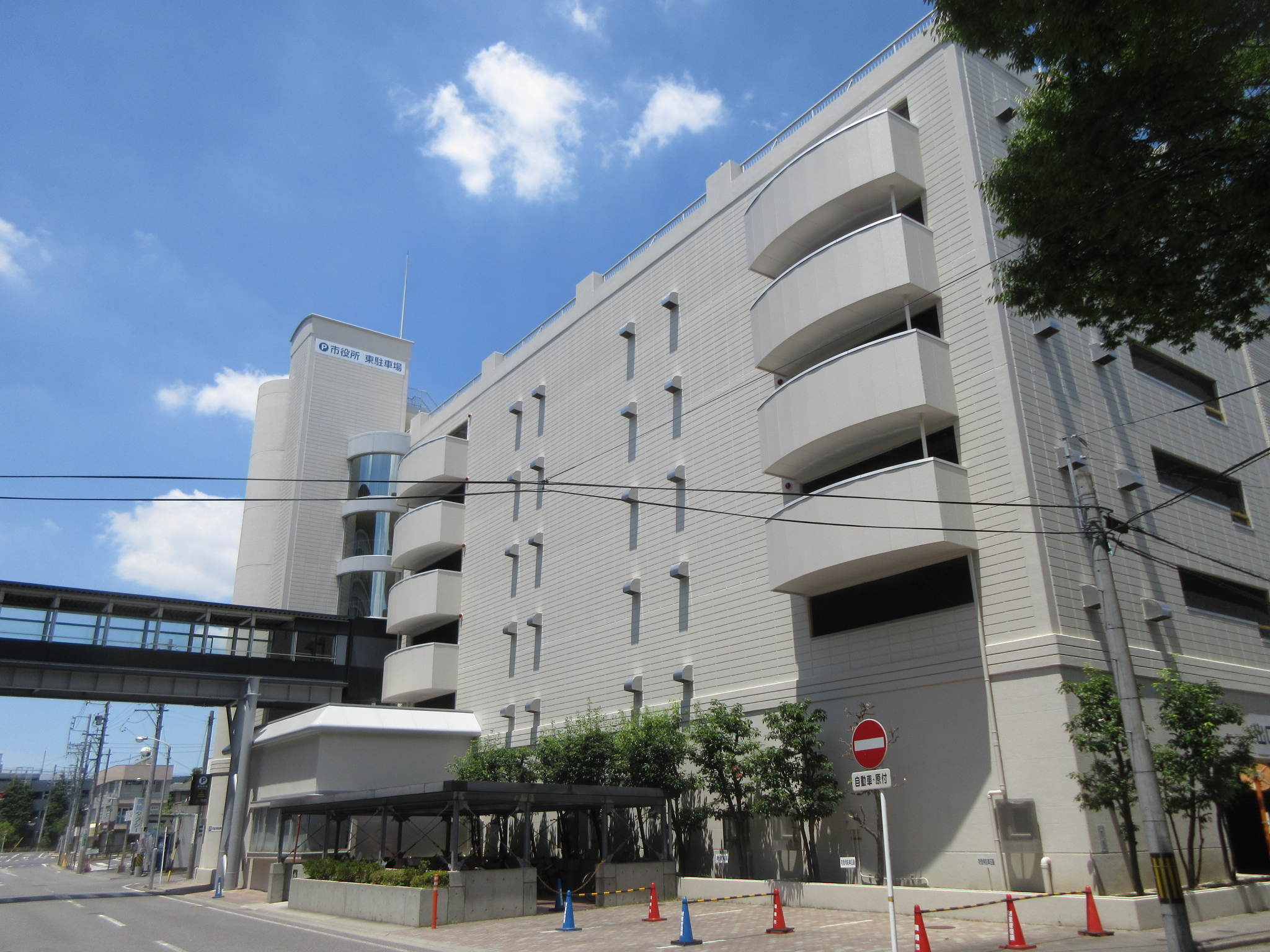 岡崎市役所東駐車場（岡崎市両町）